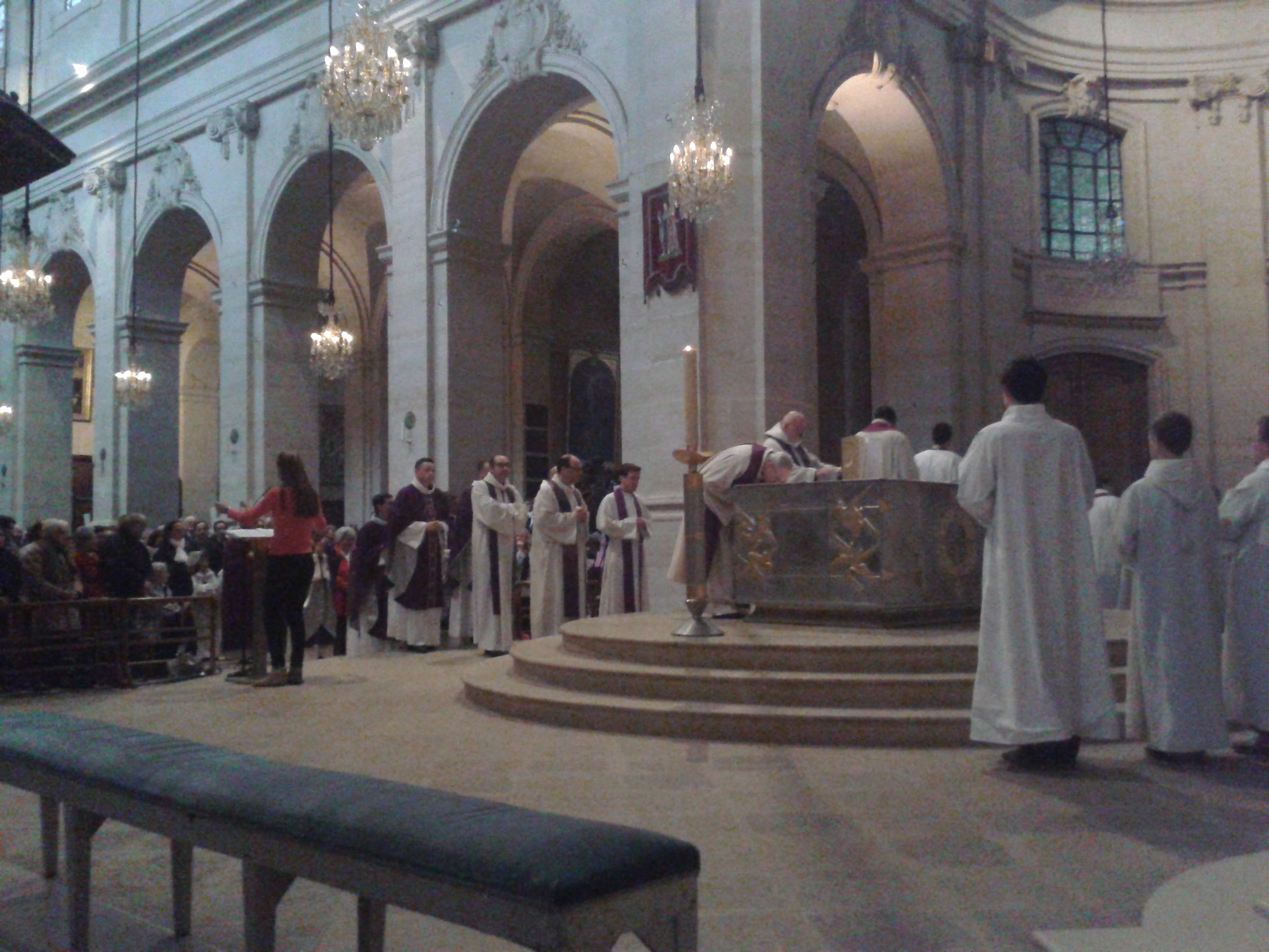 Procession messe action de grâce Mgr Leborgne